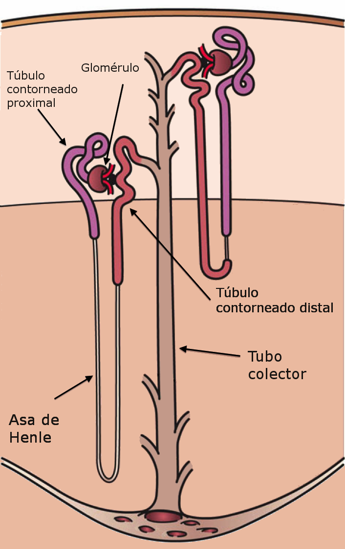 Imagen microscópica del riñón en la que pueden observarse 2 nefronas que drenan en un tubo colector.